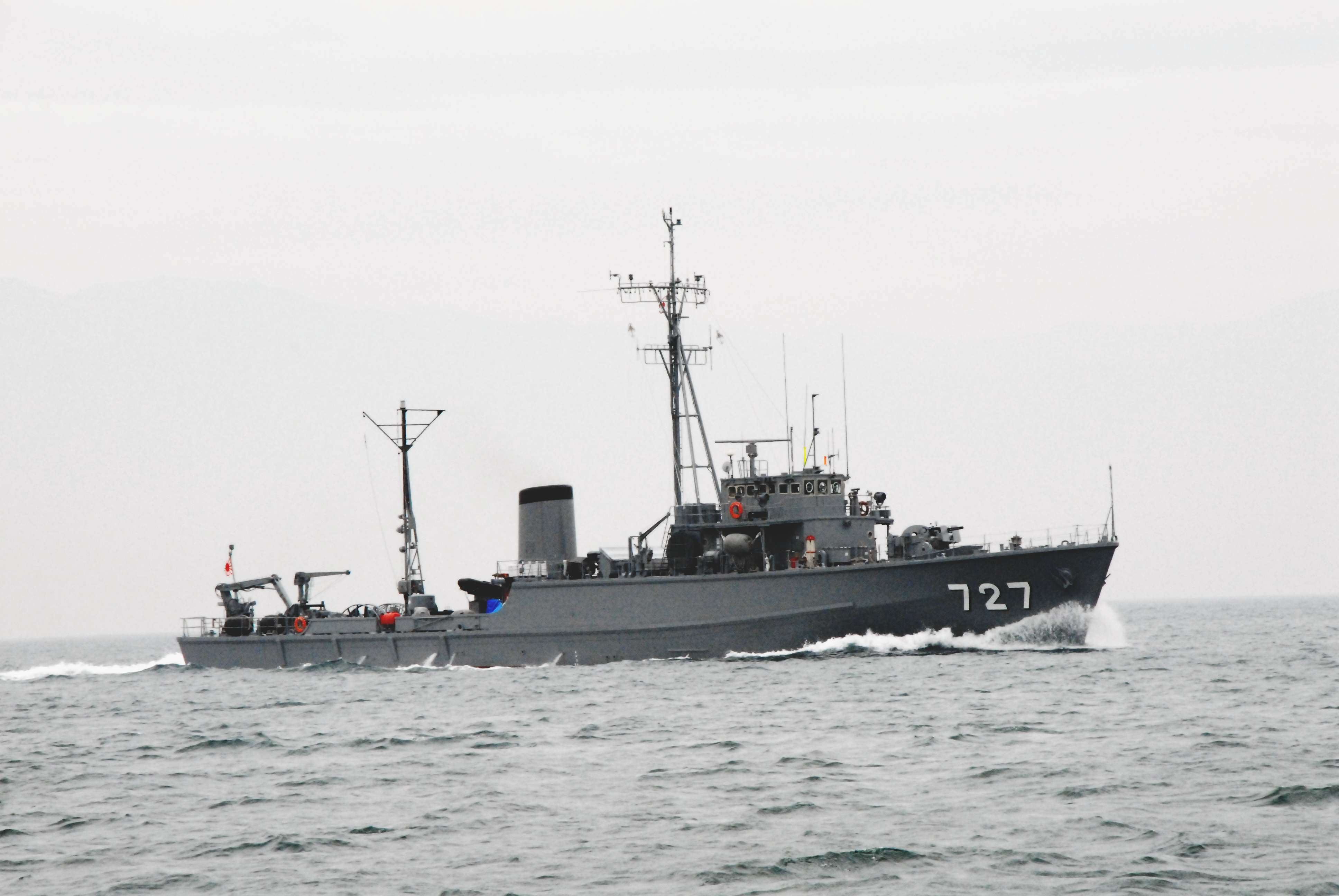 掃海管制艇「さくしま」